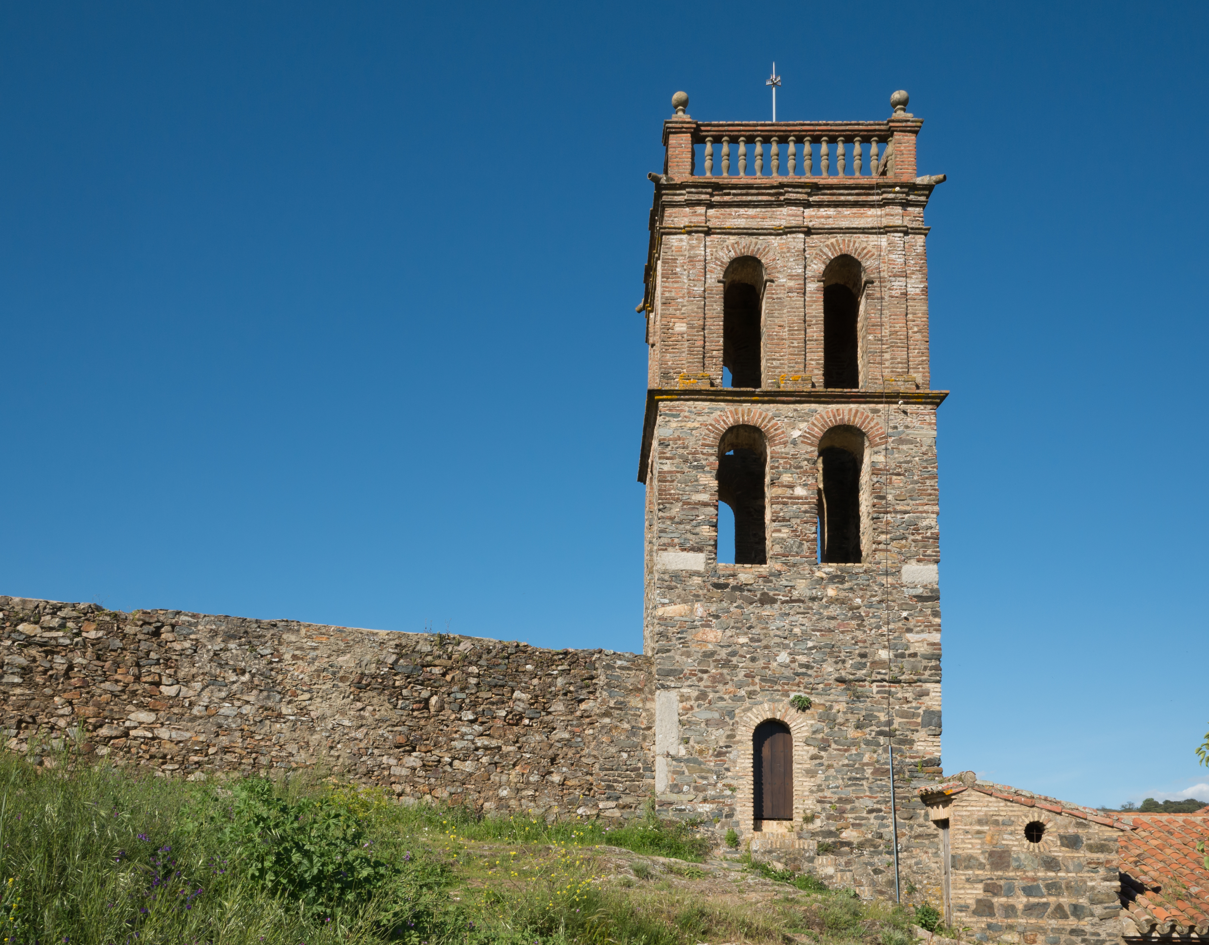 Torre de la mezquita de Almonaster La Real. Sierra de Aracena, Huelva, Andalucía, España